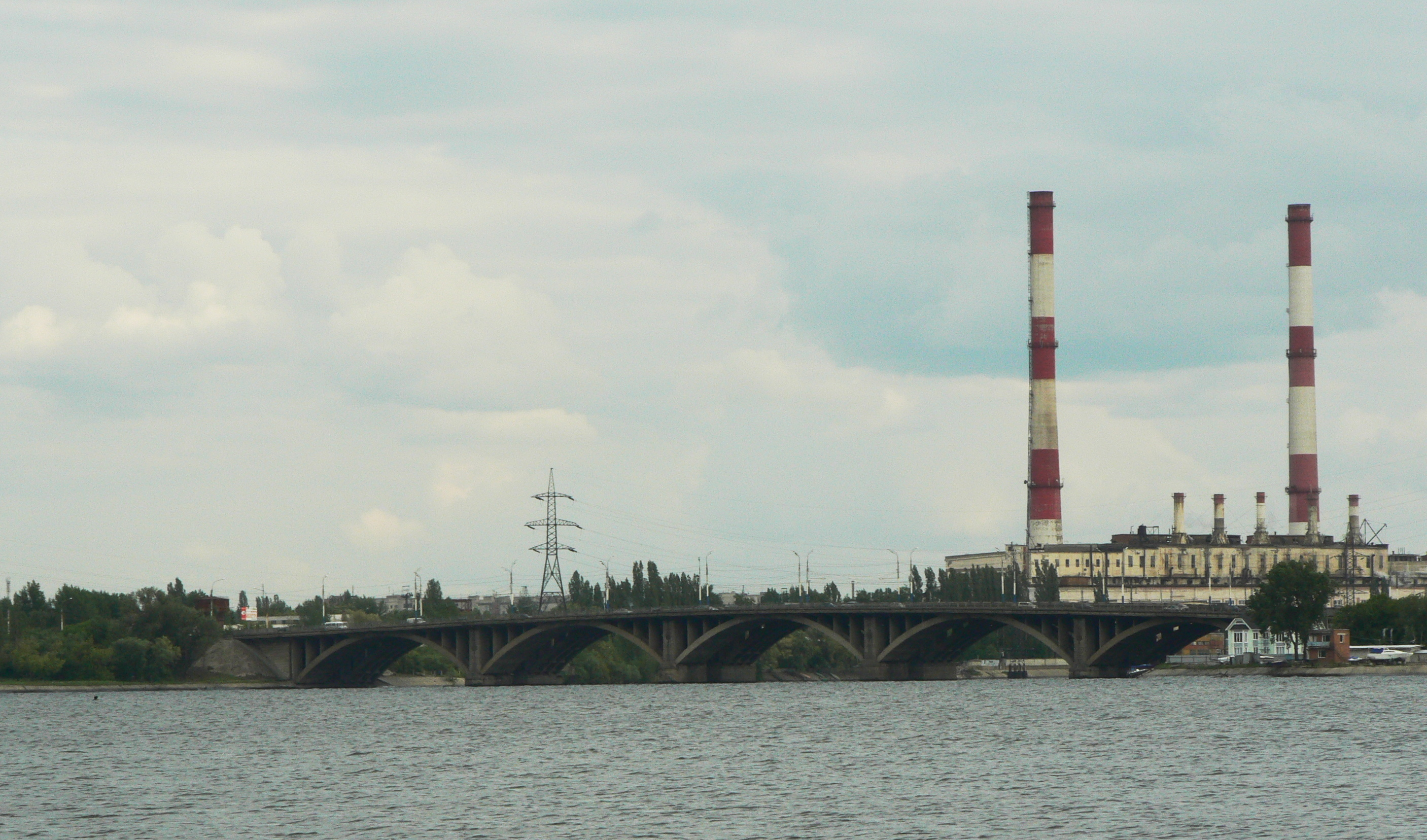 VOGRES Bridge in Voronezh